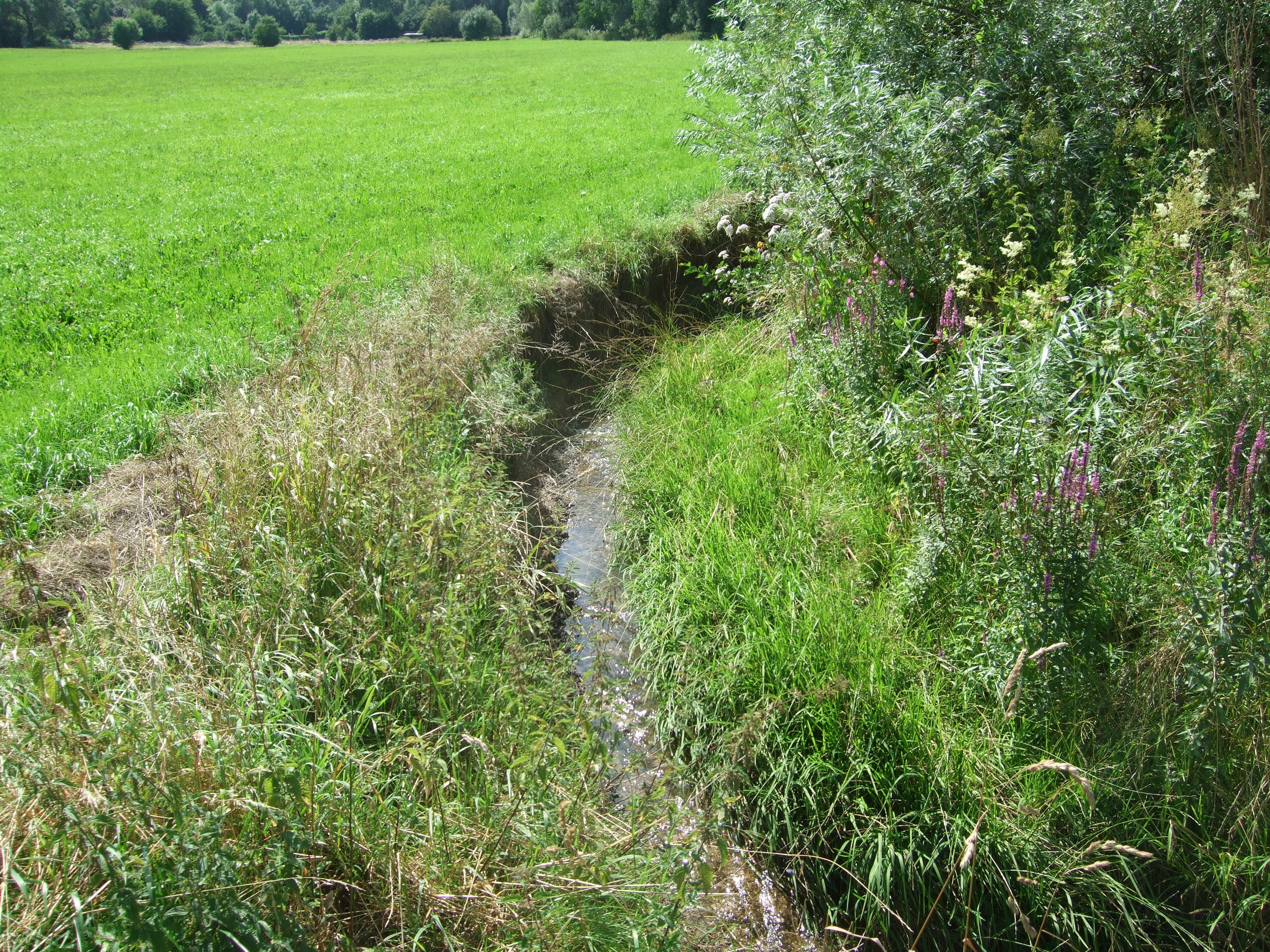 Der Stockheimer Bach in Usingen